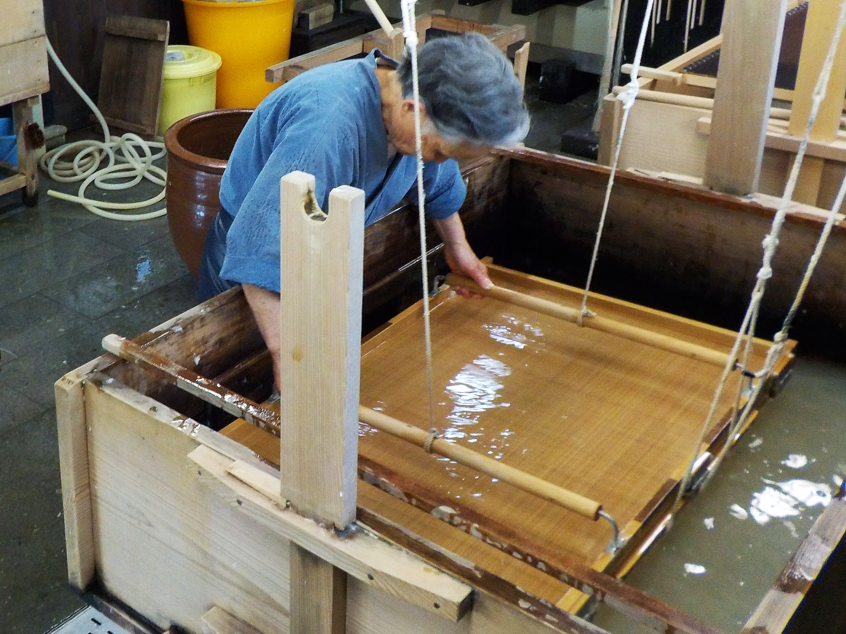 福井県越前市の「卯立の工芸館」における紙漉き見学。